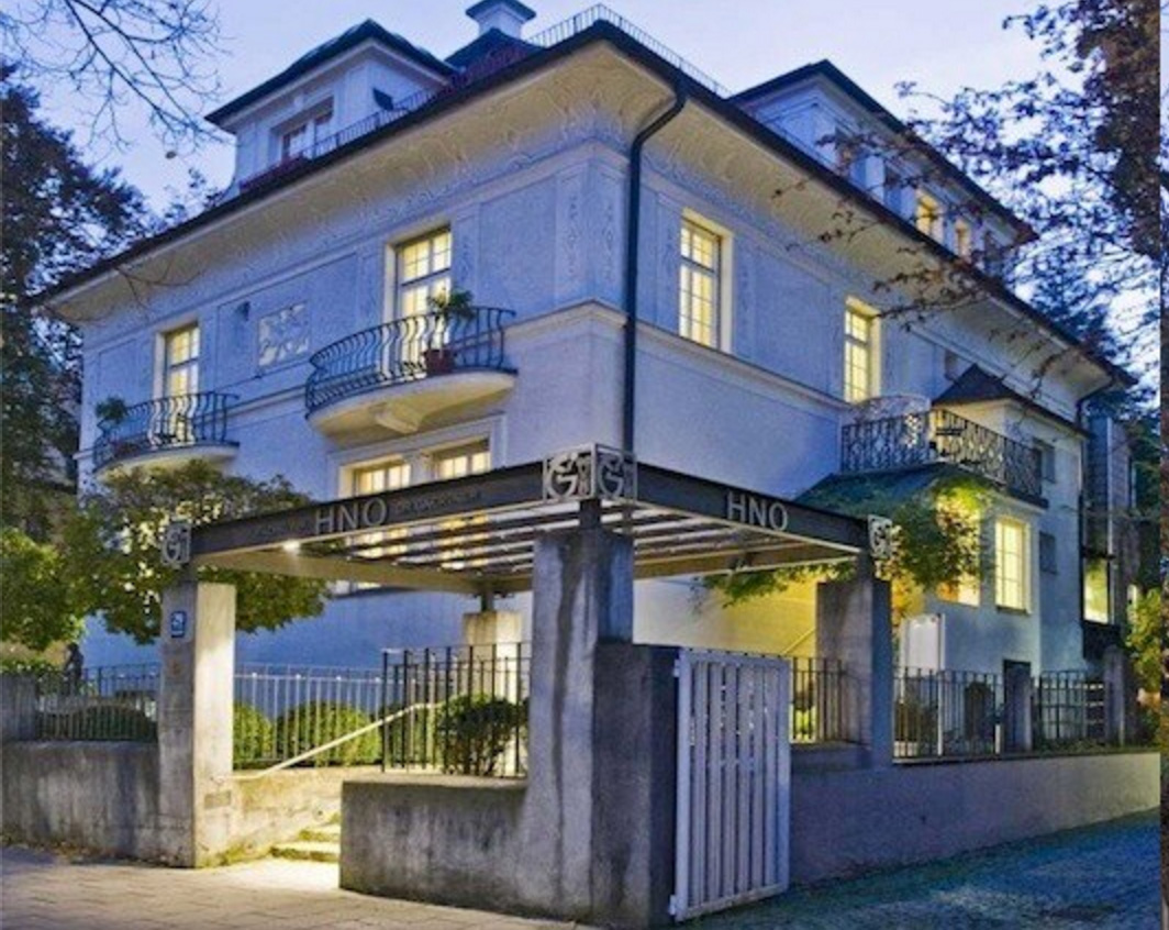 HNO Klinik Dr. Gaertner Abend